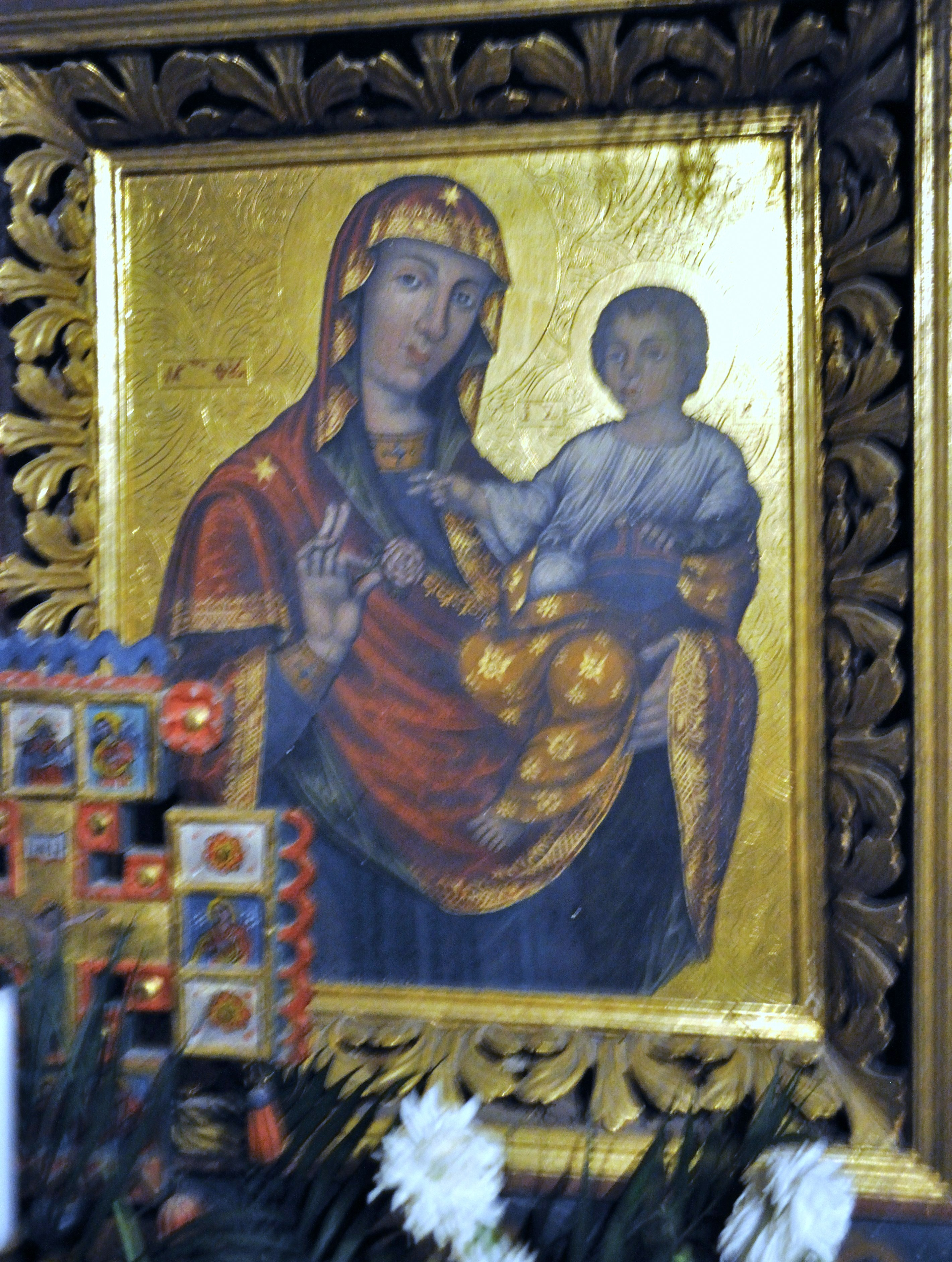 Biserica de lemn „Sfinții Arhangheli Mihail și Gavriil” din Șurdești, județul Maramureș